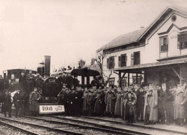 Картичка от Скопие при смяната на табелата на града от османската със сръбска.